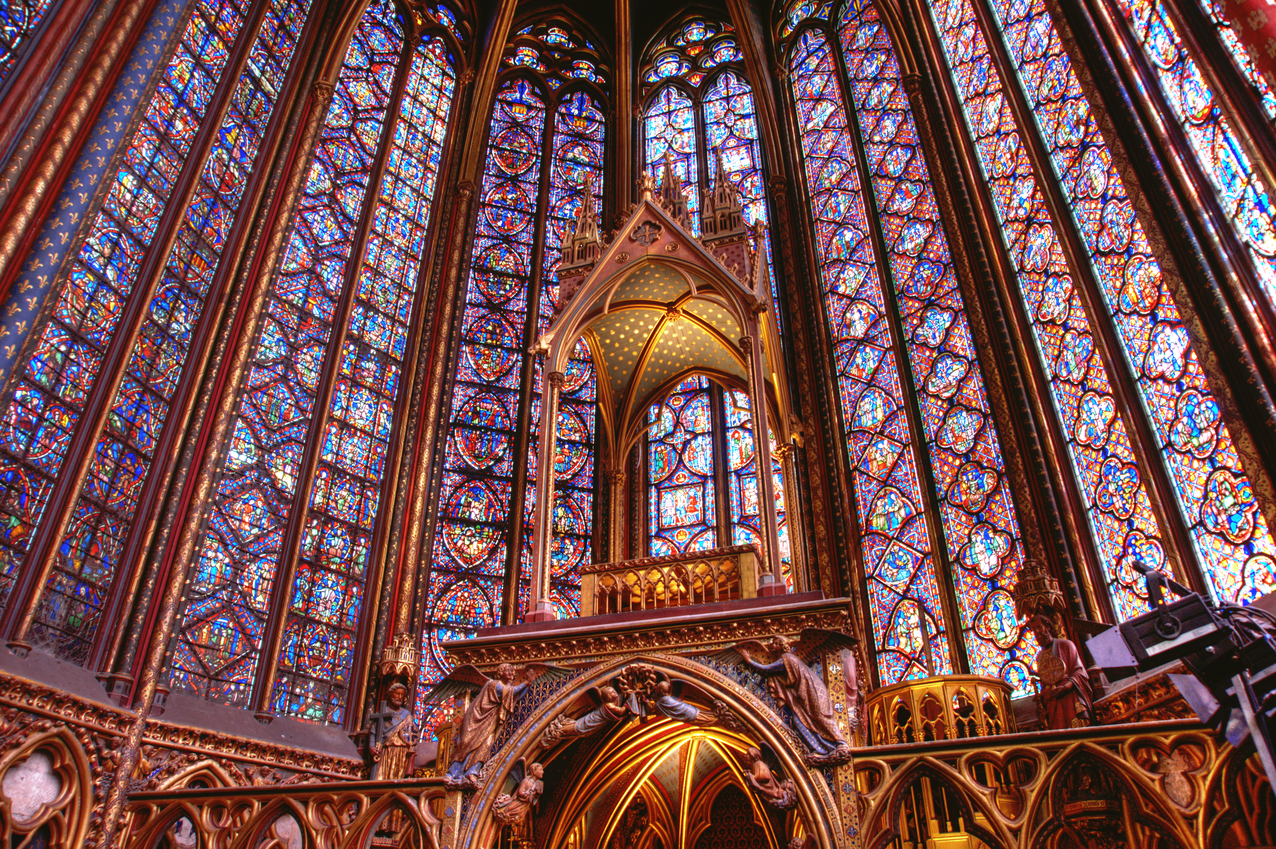 Paris : Sainte-Chapelle - Détail de l'autel et des vitraux